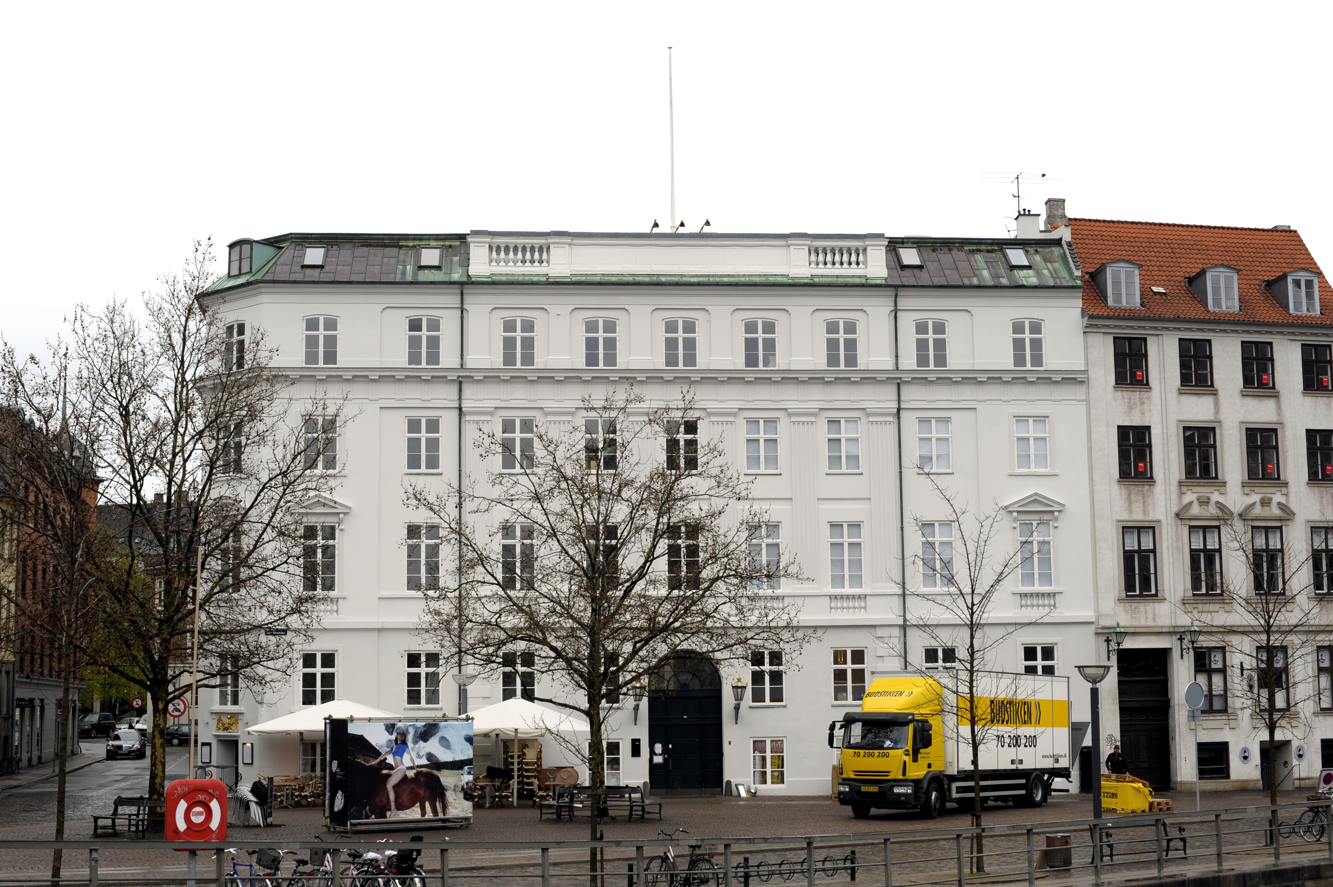 Bild av fasaden till Nordiska Rådet/Ministerrådets lokaler i Köpenhamn.